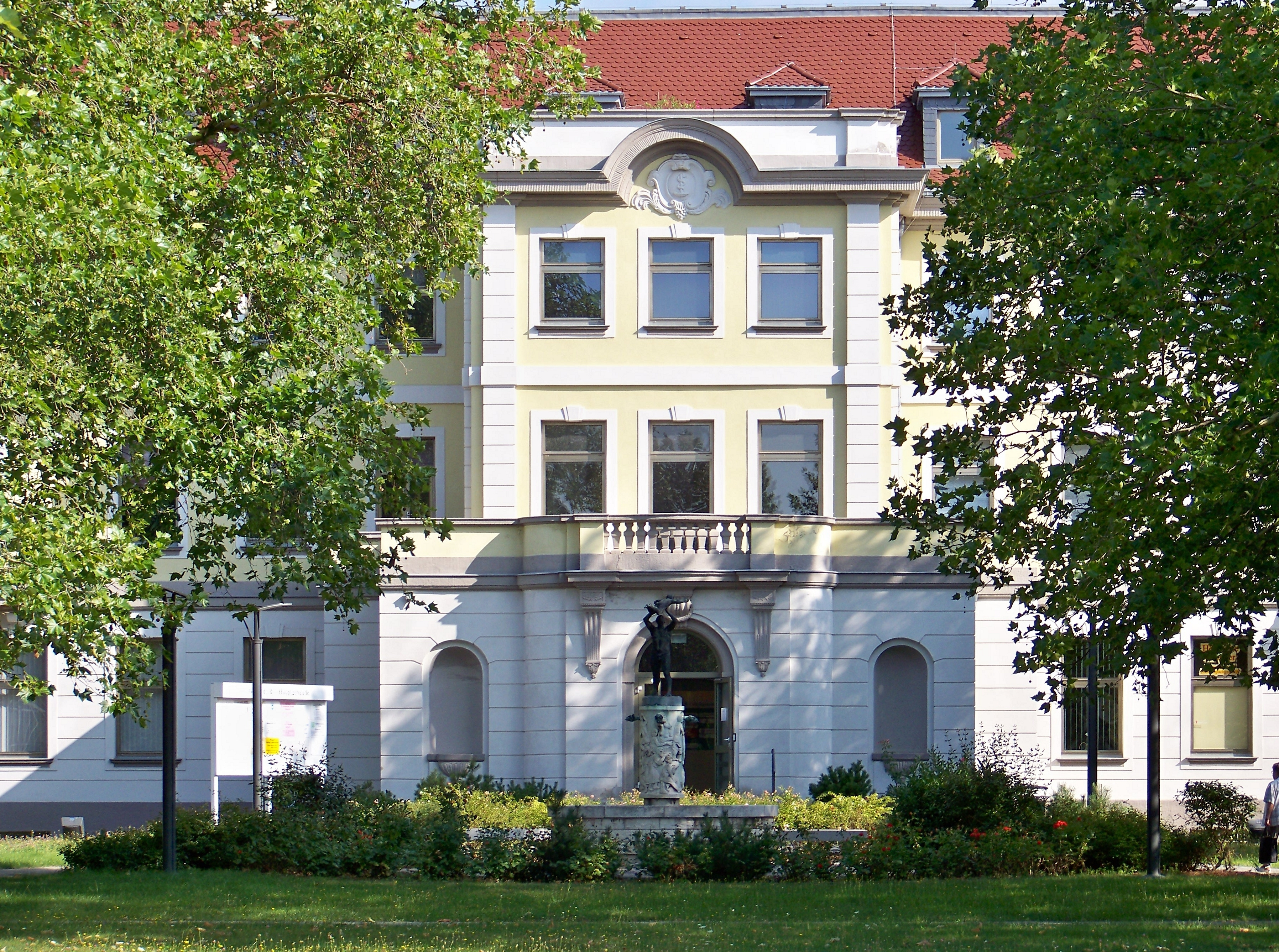 Gesundheitszentrum in Leuna